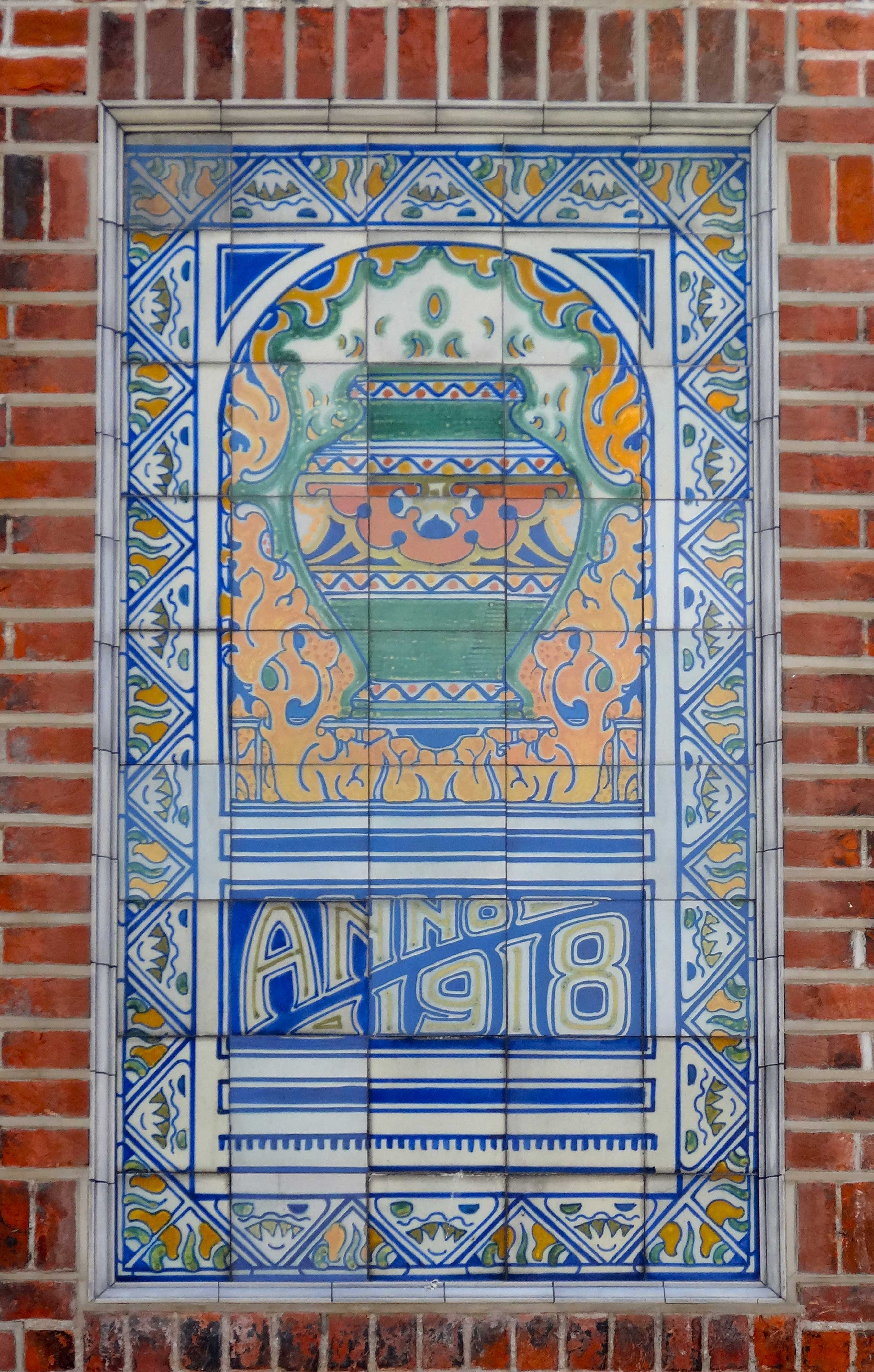 Tegeltableau in neo-renaissancestijl, van de voormalige plateelbakkerij Zuid-Holland waarschijnlijk gemaakt in 1918 en ontworpen door Daniël Harkink (1862-1953), tekenaar en plateelschilder bij Plazuid. Voorstelling: Pot met eeuwige vlam